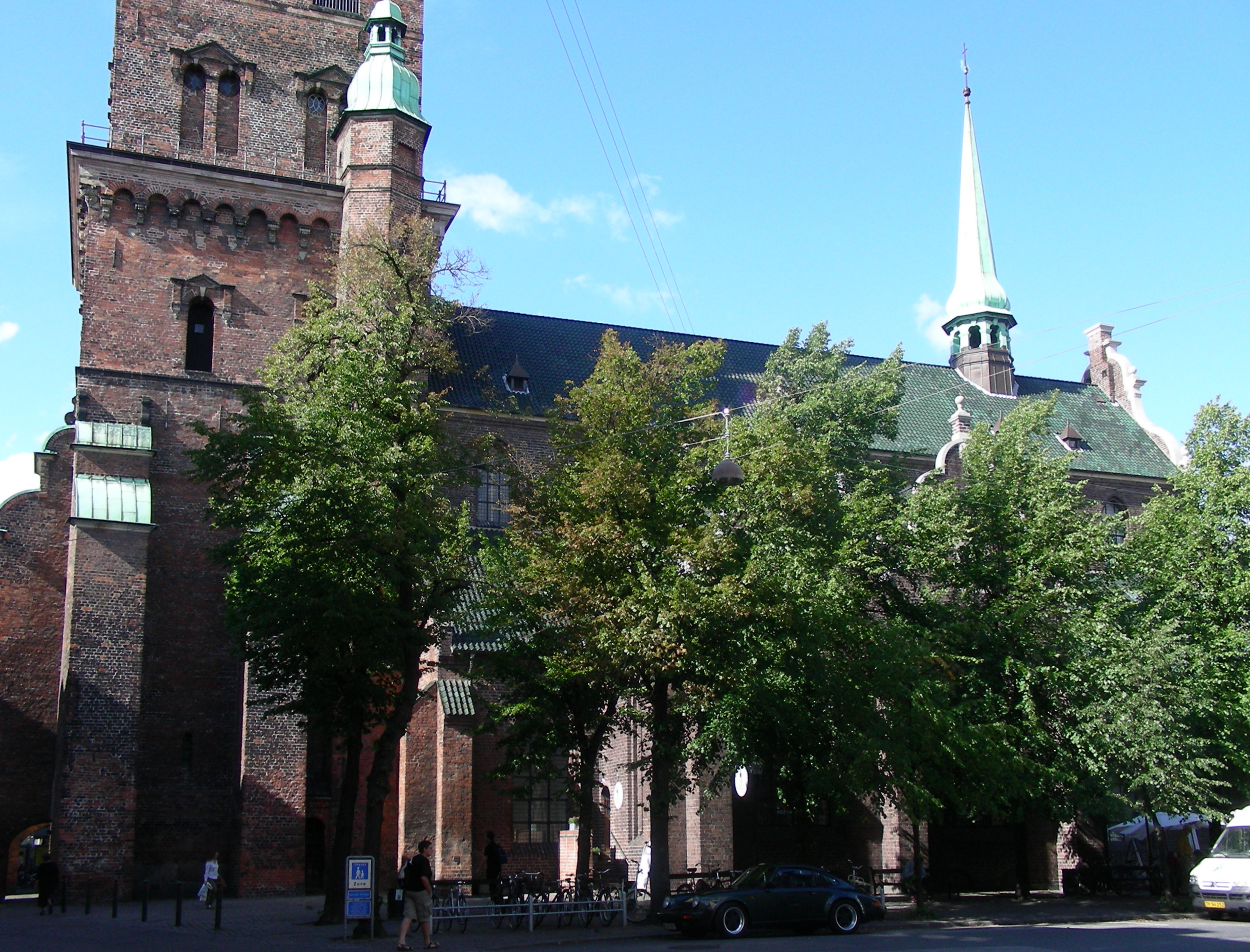 Nikolaj exhibition building, Copenhagen, Denmark